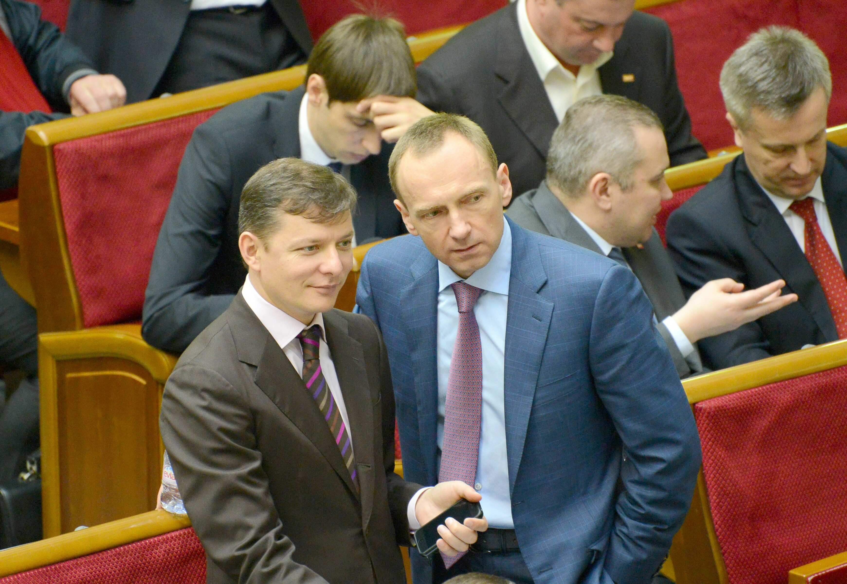 ВЕРХОВНА РАДА УКРАЇНИ 2013 , фото Вадим Чуприна